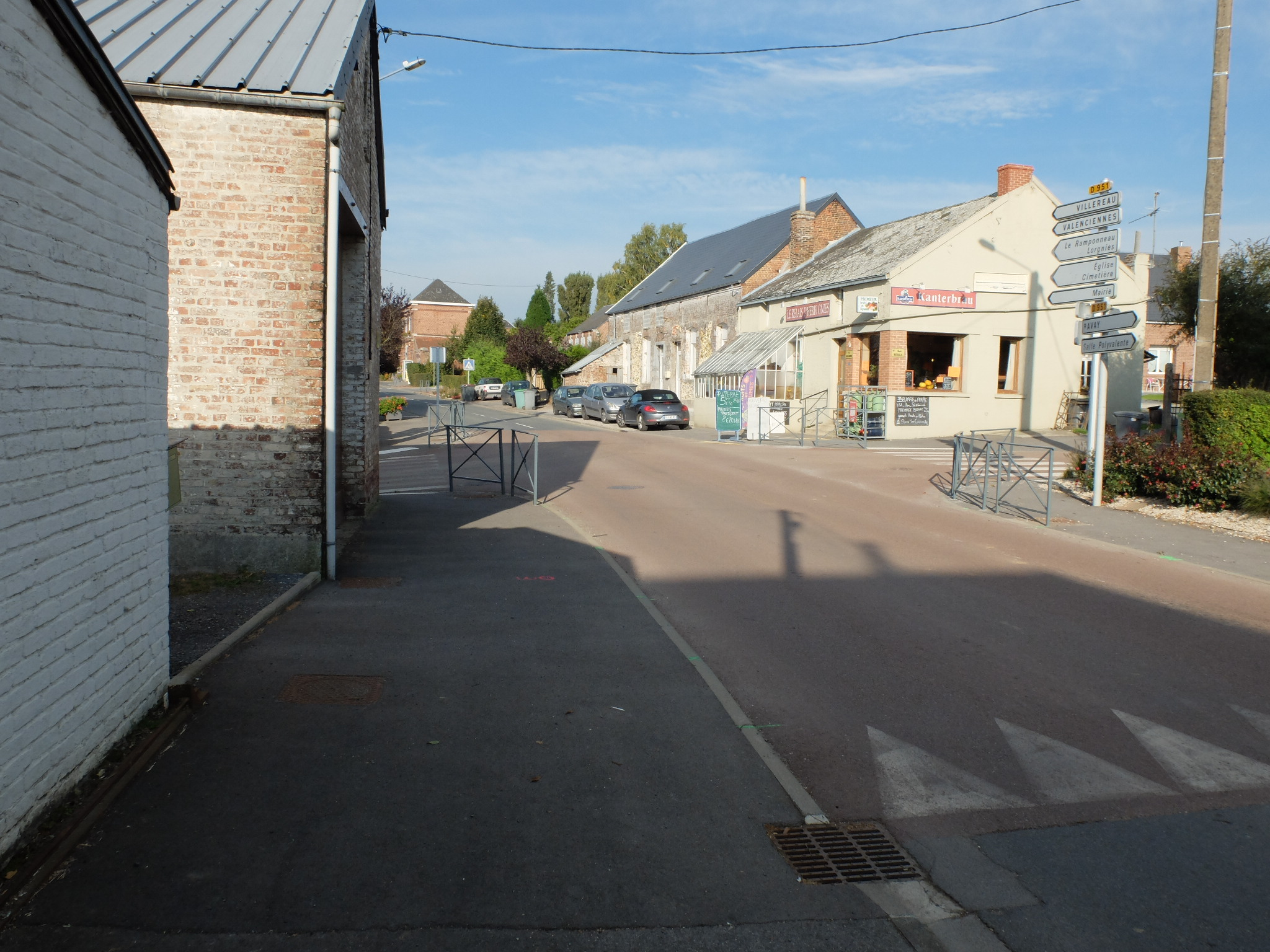 Vue de la rue Berlandois dans le hameau d'Herbignies qui fait partie de la commune de Villereau, dans le département du Nord.